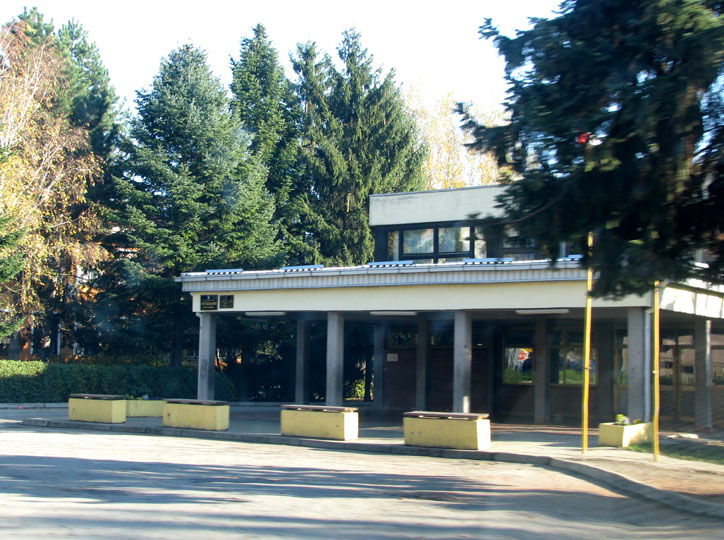 Osnovna škola u Novom Marofu, Varaždinska županija